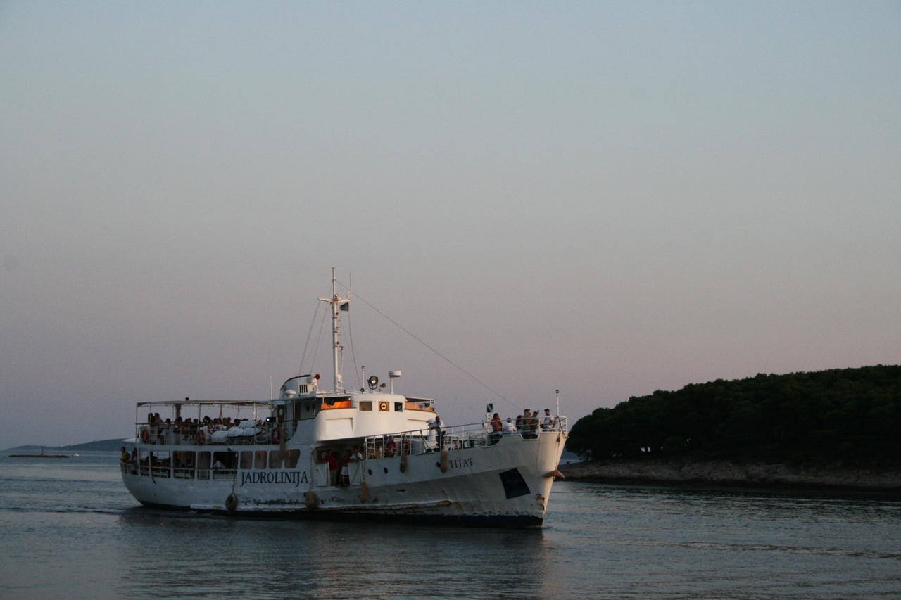 Le Tijat à Prvic Luka ( Croatie )